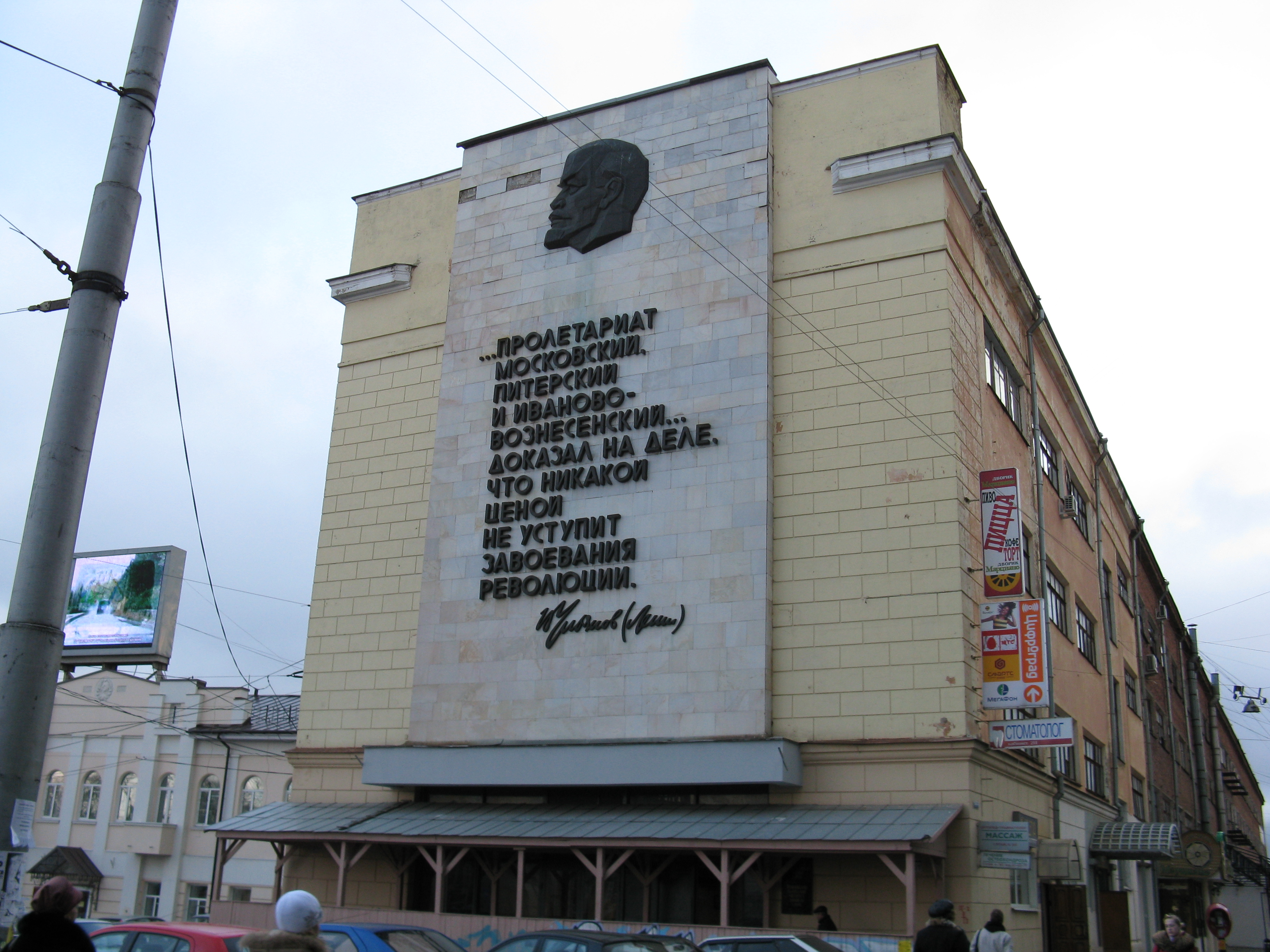 Дом на площади Революции с профилем и словами Ленина.